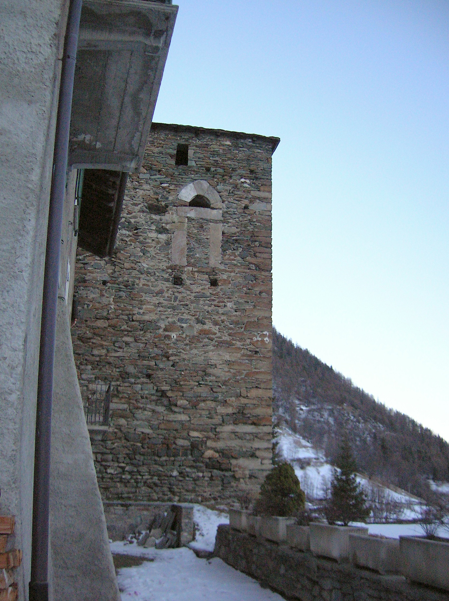 Torre di Vachéry, Etroubles, Valle d'Aosta, Italia.